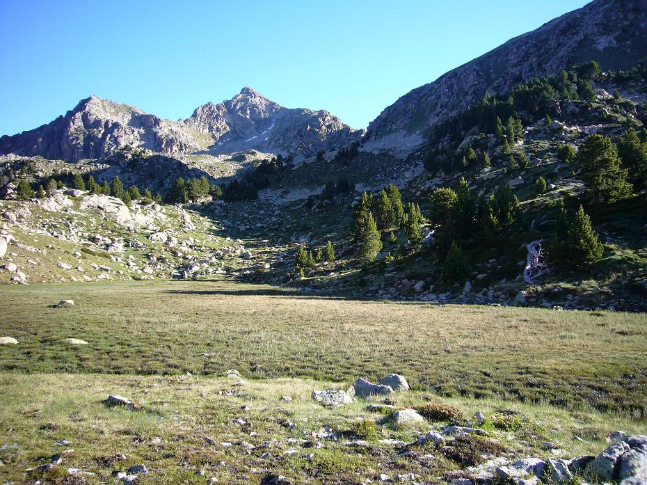 Bases d'Estany Roi; la Vall de Boí, Alta Ribagorça, Catalunya